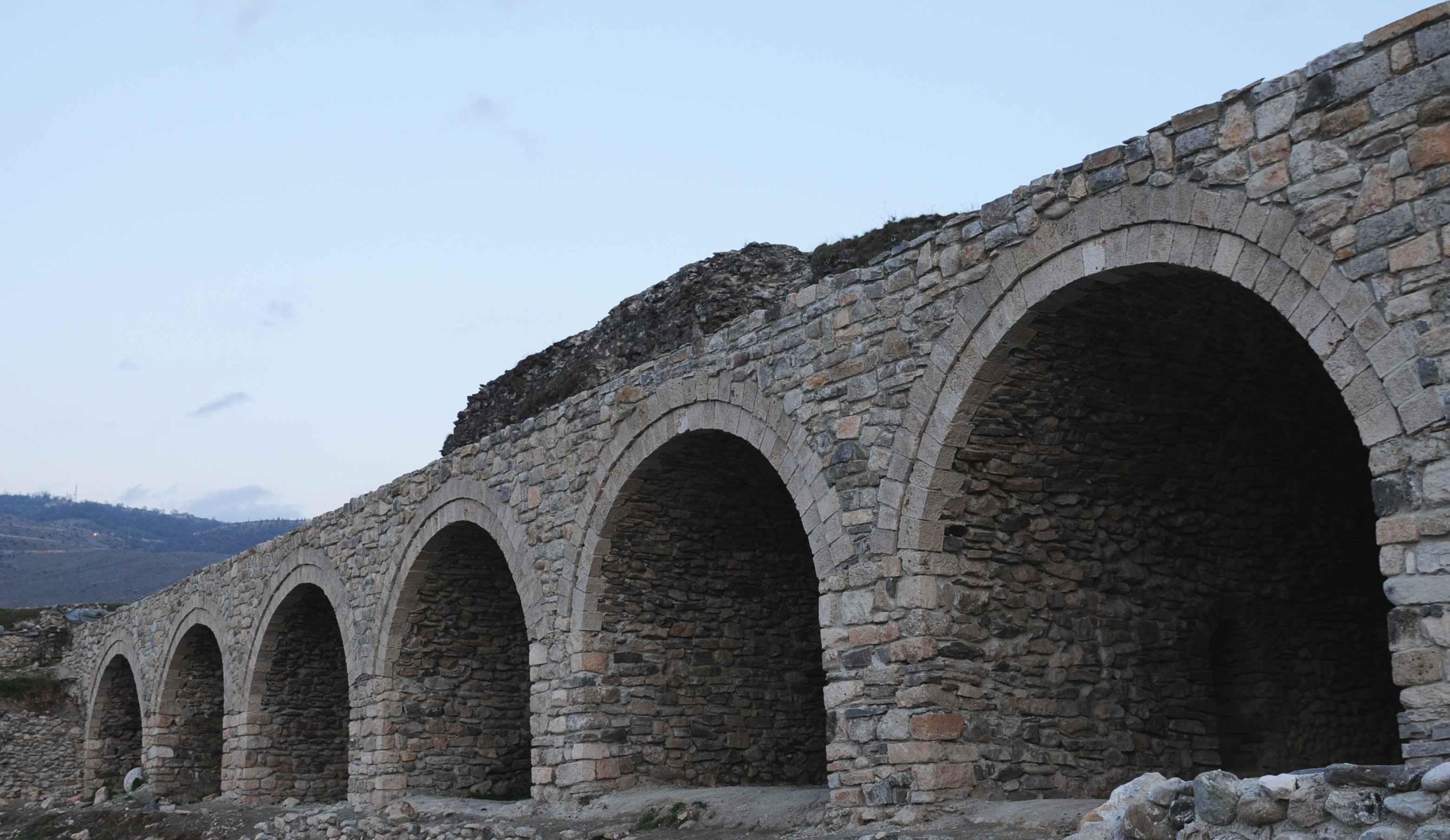 Kaljaja